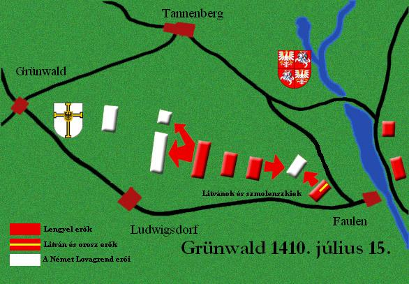 A Grünwaldi csata térképe.